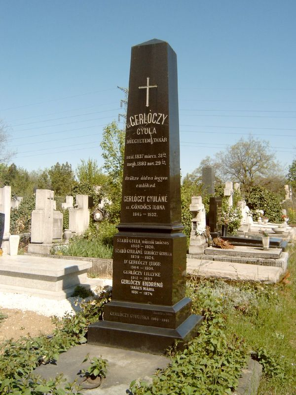 Gerlóczy Gyula (Pest, 1837. március 31. – Görz, 1893. november 29.), Gerlóczy Károly öccse, jogász, egyetemi tanár és családjának sírja Budapesten. Új köztemető: 16/3-1-15/36.